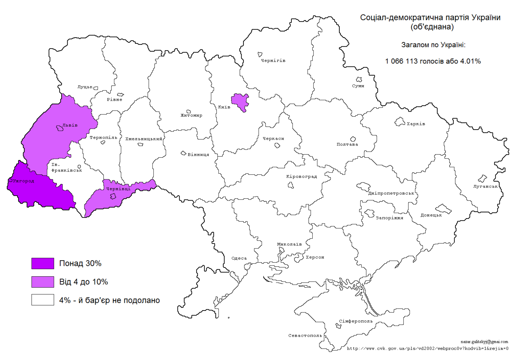 Рівень підтримки СДПУ(о) по областях